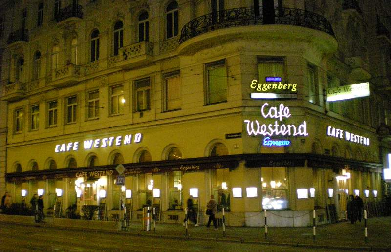 Das Cafe Westend Kreuzung Gürtel/Mariahilfer Straße am Abend